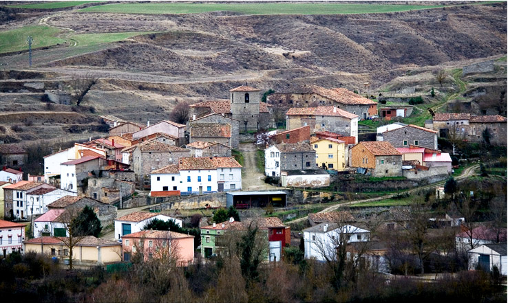 Vallarta de Bureba, en Burgos, España.